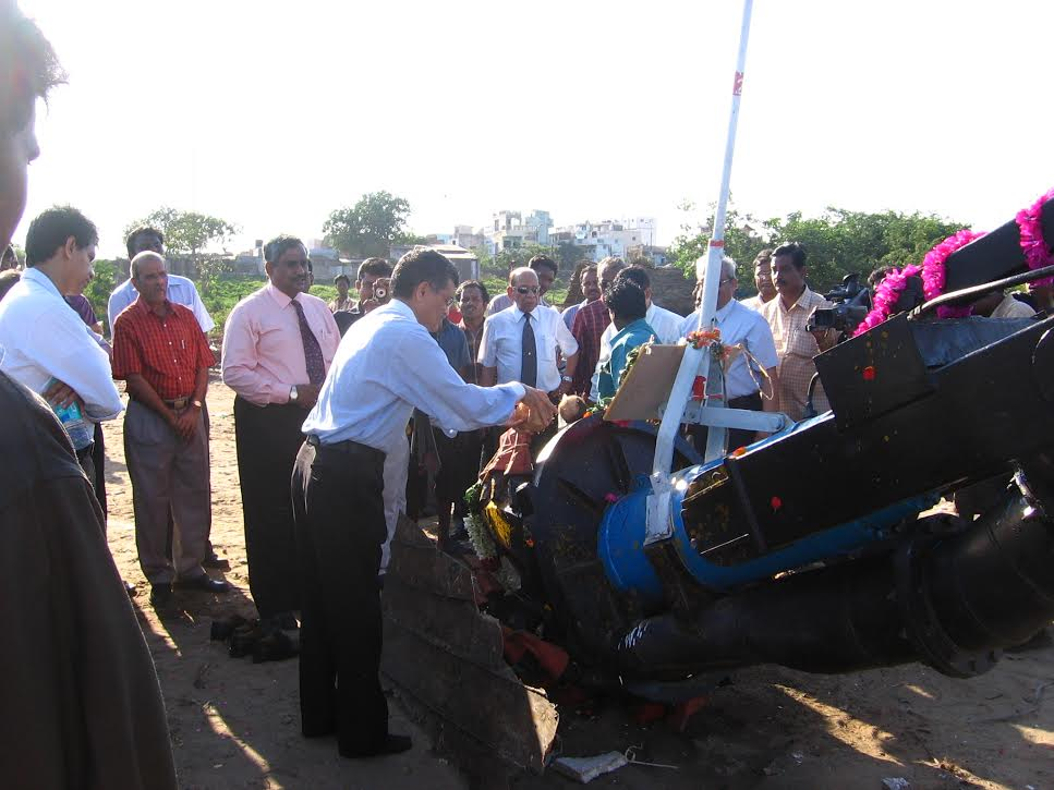 שבירת אגוז קוקוס על שיני המחפר להשקת כלי השיט